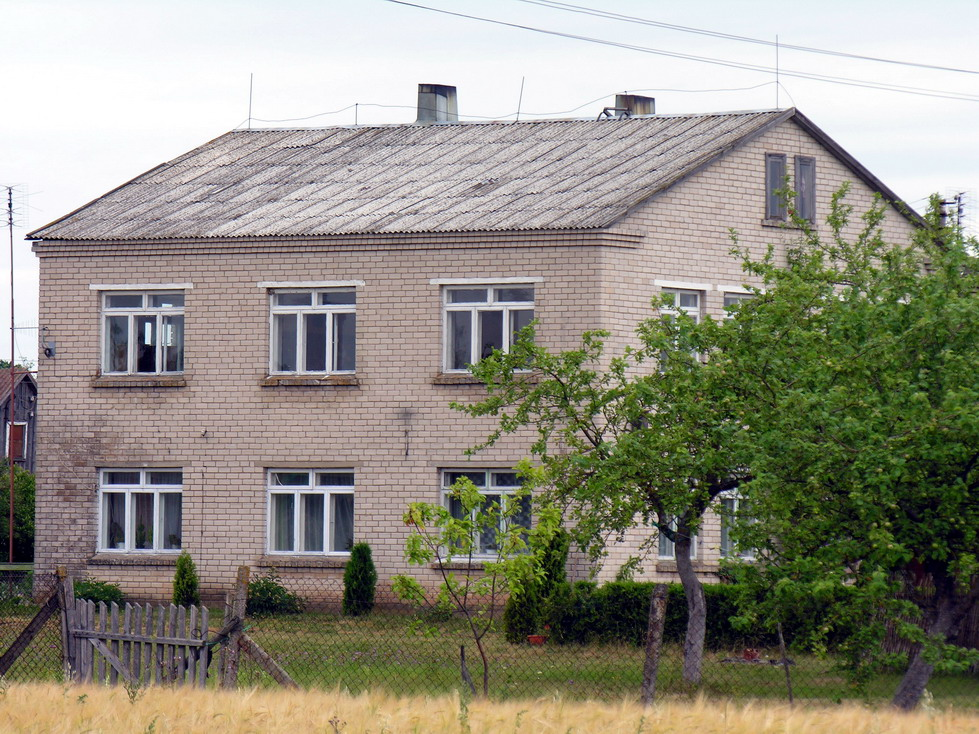 Svirkančiai, Mažeikių rajonas, Viekšnių seniūnija Svirkančių pradinė mokykla Foto: Algirdas, 2006 m. liepos 18 d., Lietuva